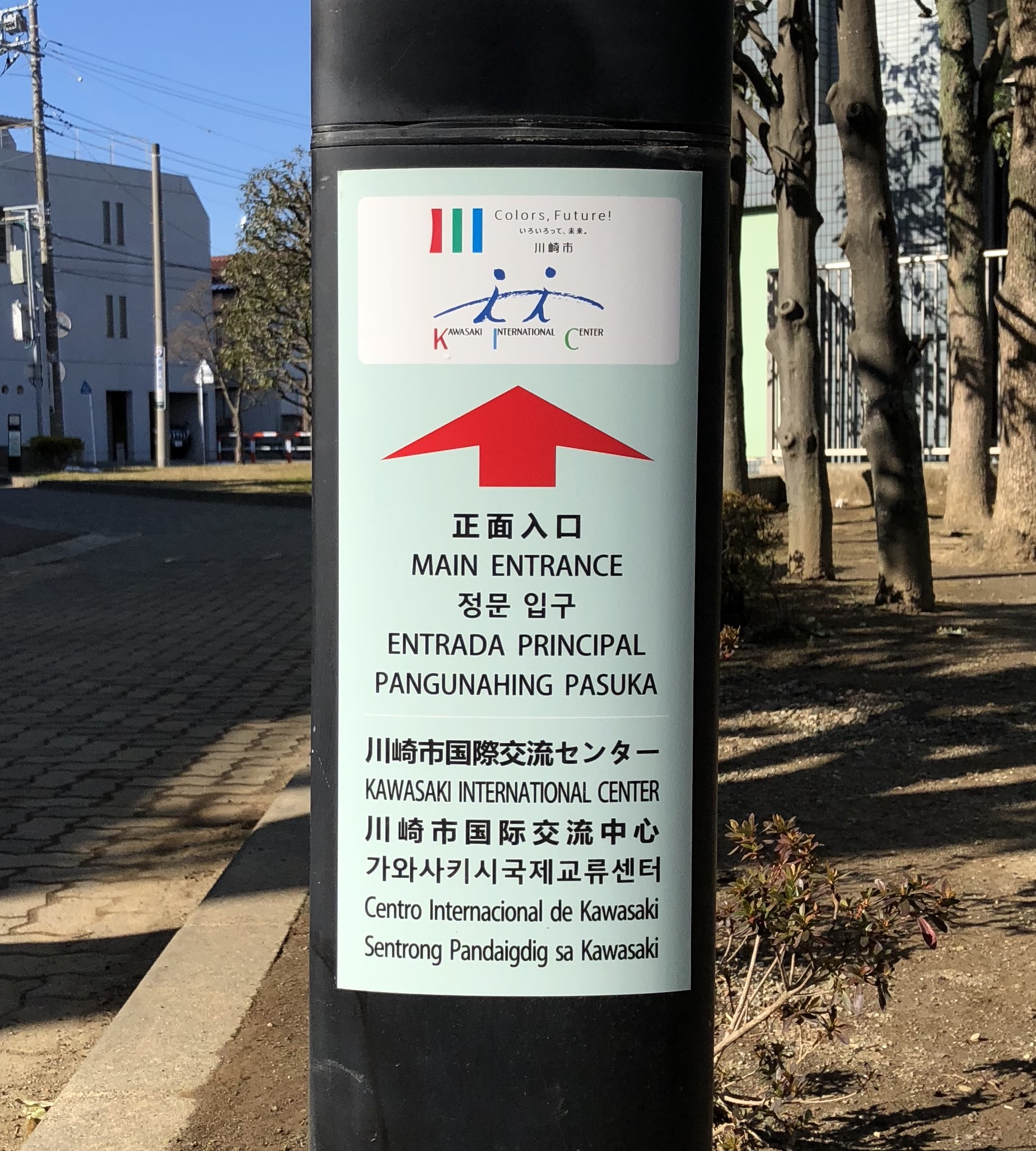 川崎市中原区木月祇園町の川崎市国際交流センターにある複数の言語で書かれた看板